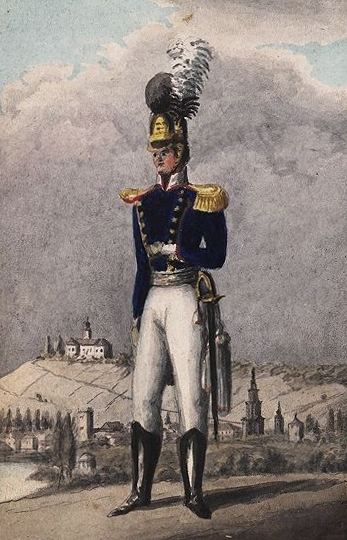 Christian von Martens in seiner Uniform